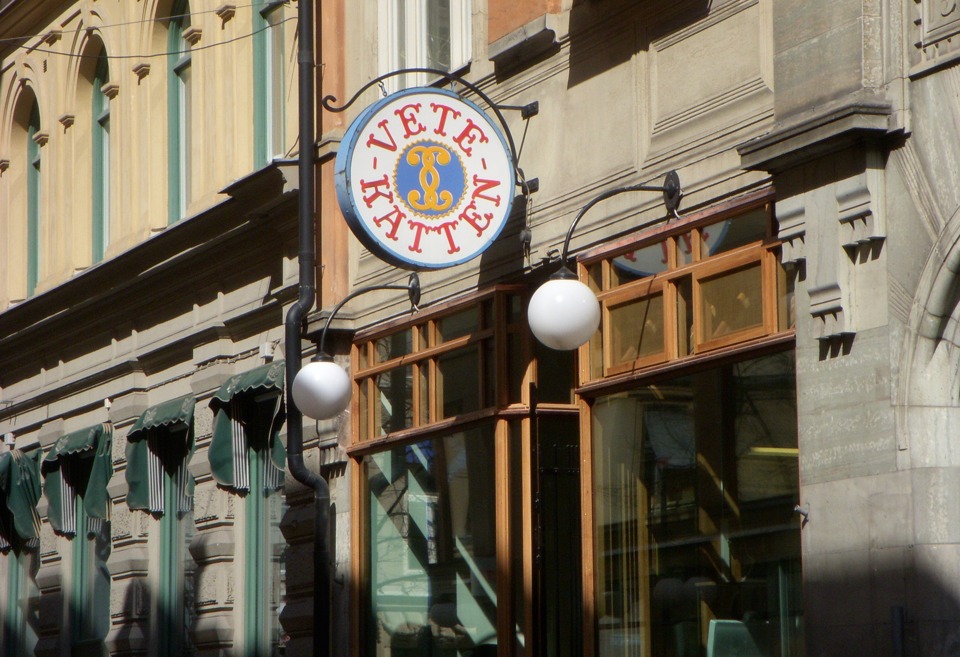 Vetekatten i Stockholm